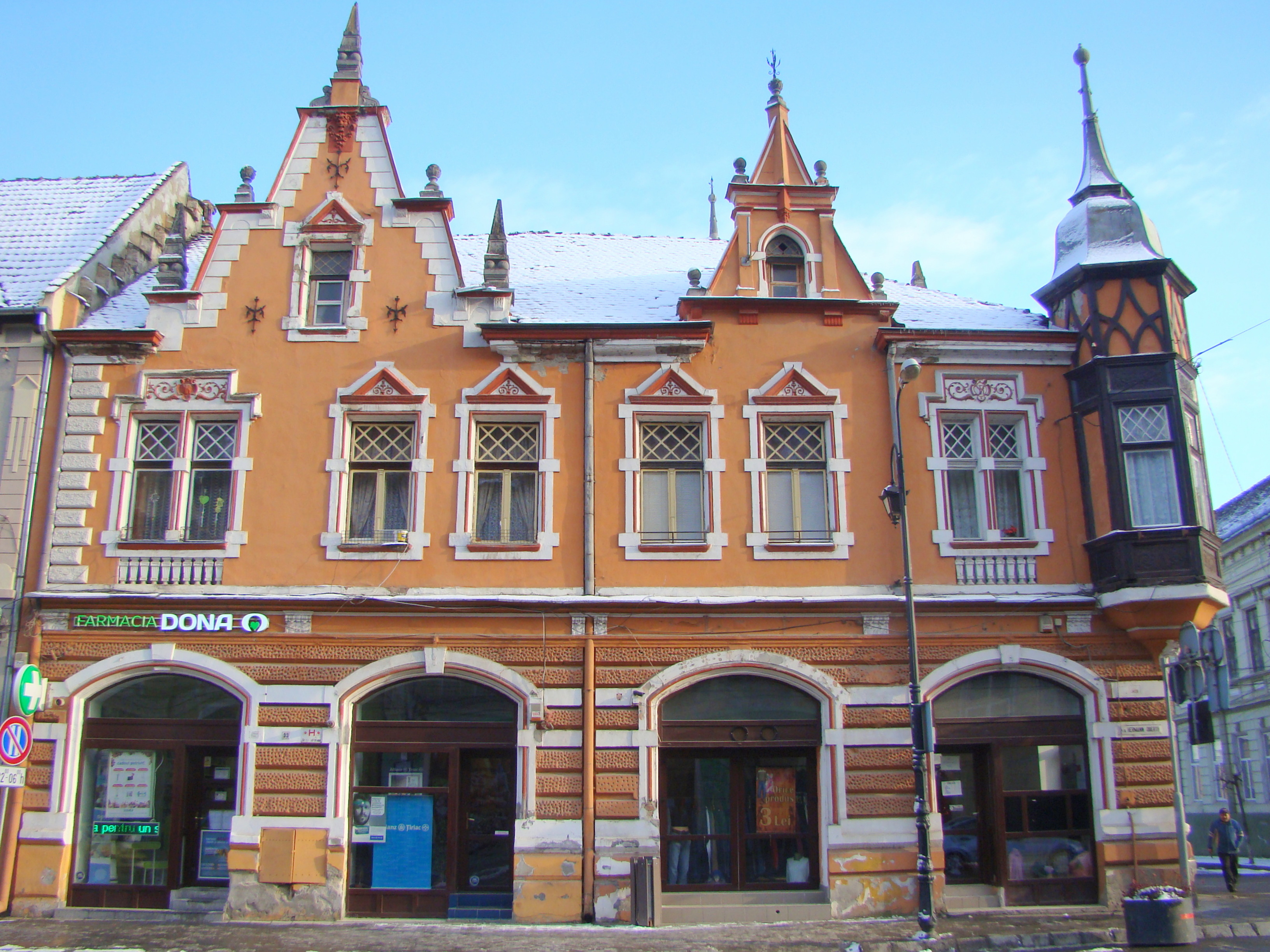 Casă, municipiul Sighișoara, Piața Oberth Hermann 34, sf. sec. XIX